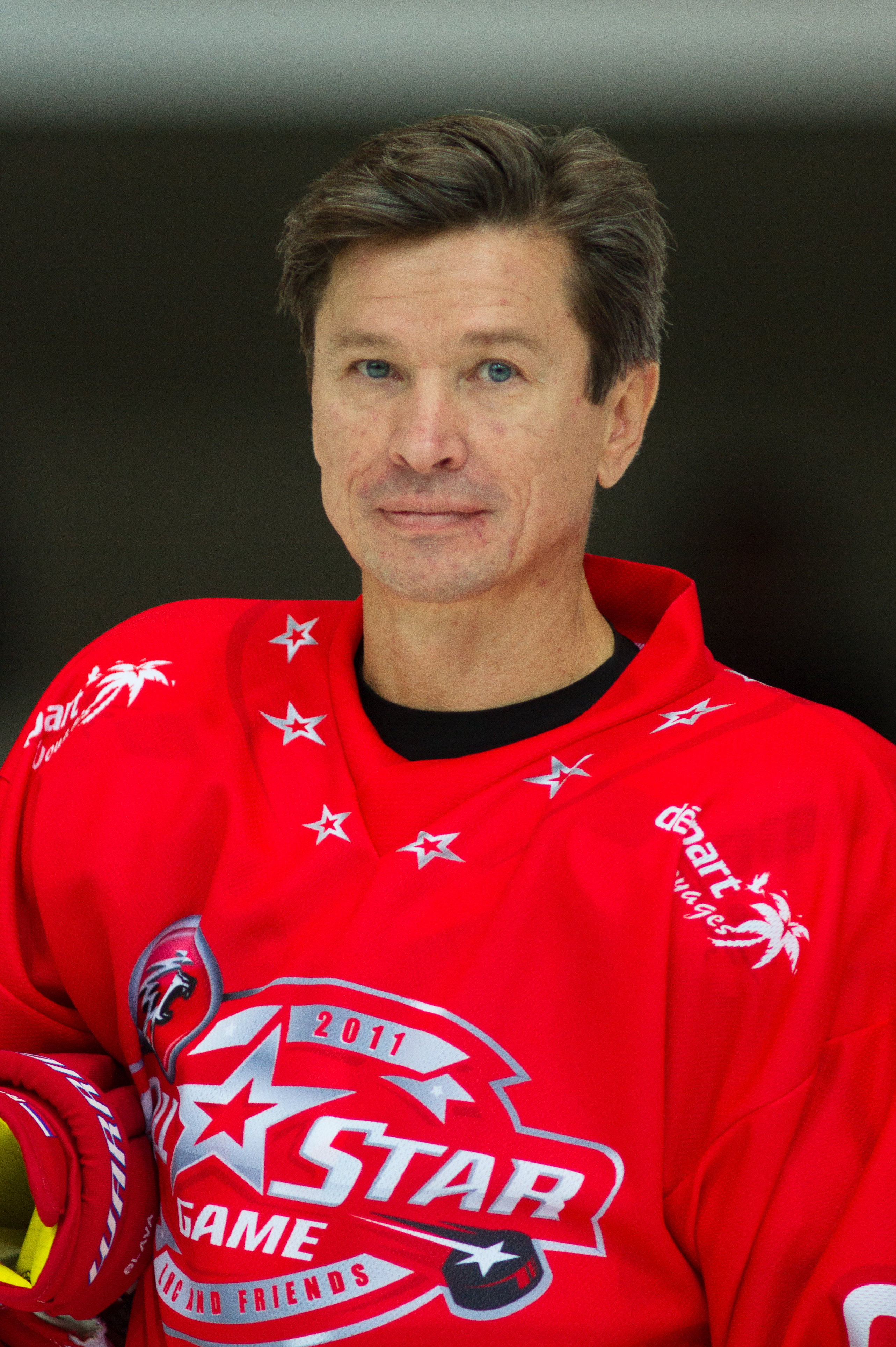 Slava Bykov à Lausanne en 2011.